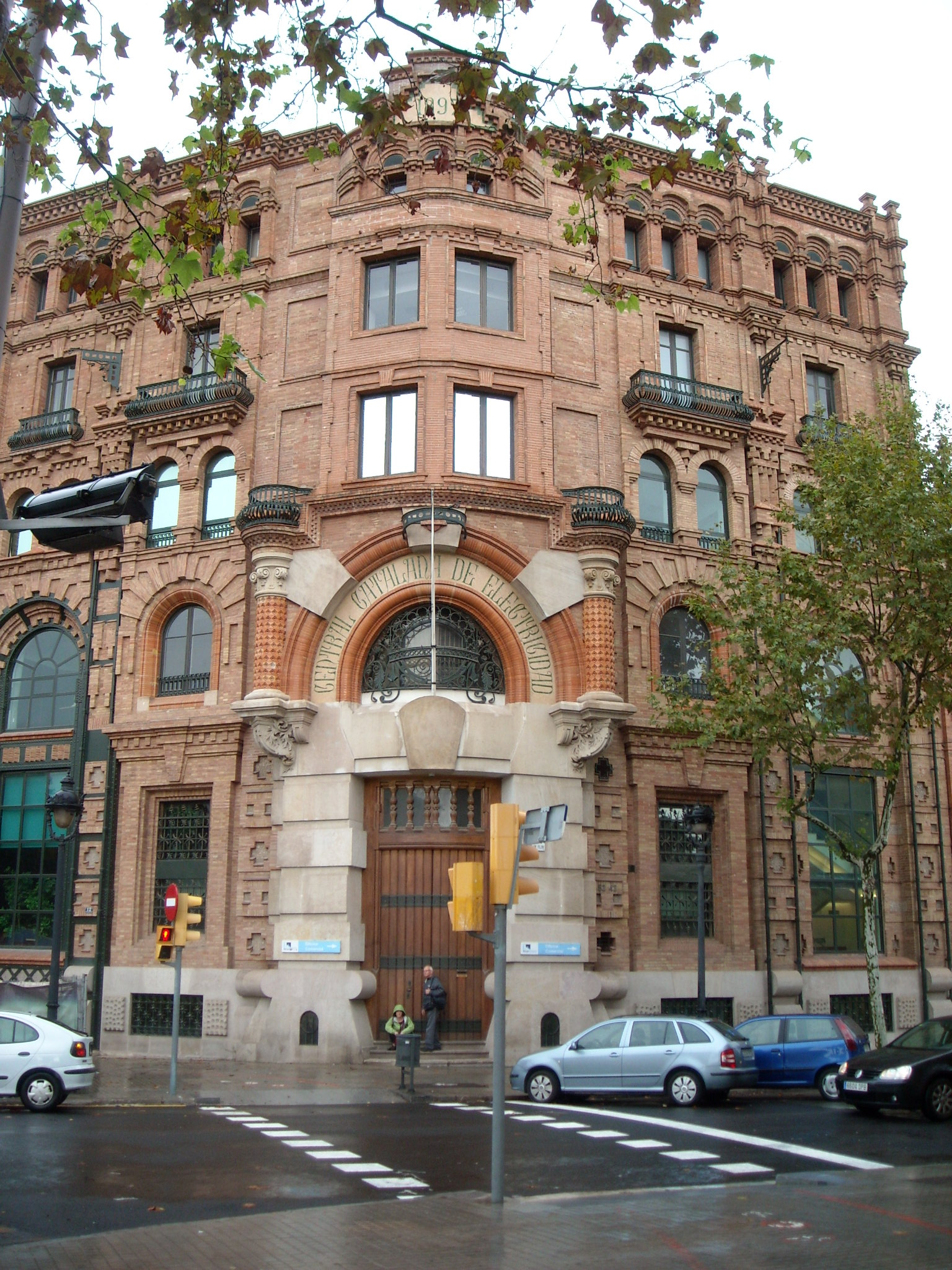 Cantó de l'edifici Fecsa i entrada principal.